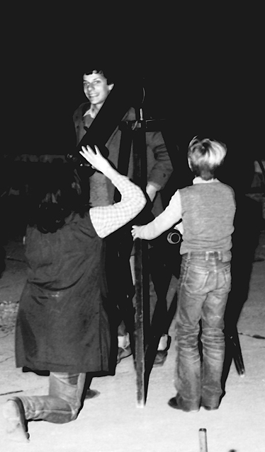 Drago Sirovica u društvu drugih članova Astronomske sekcije na tadašnjoj krovnoj terasi zgrade Gimnazije u Šibeniku, nad teleskopom Zeiss 110/1100 mm izvorno brodske namjene kojeg je Sekcija dobila nakon osnutka 1965. godine.